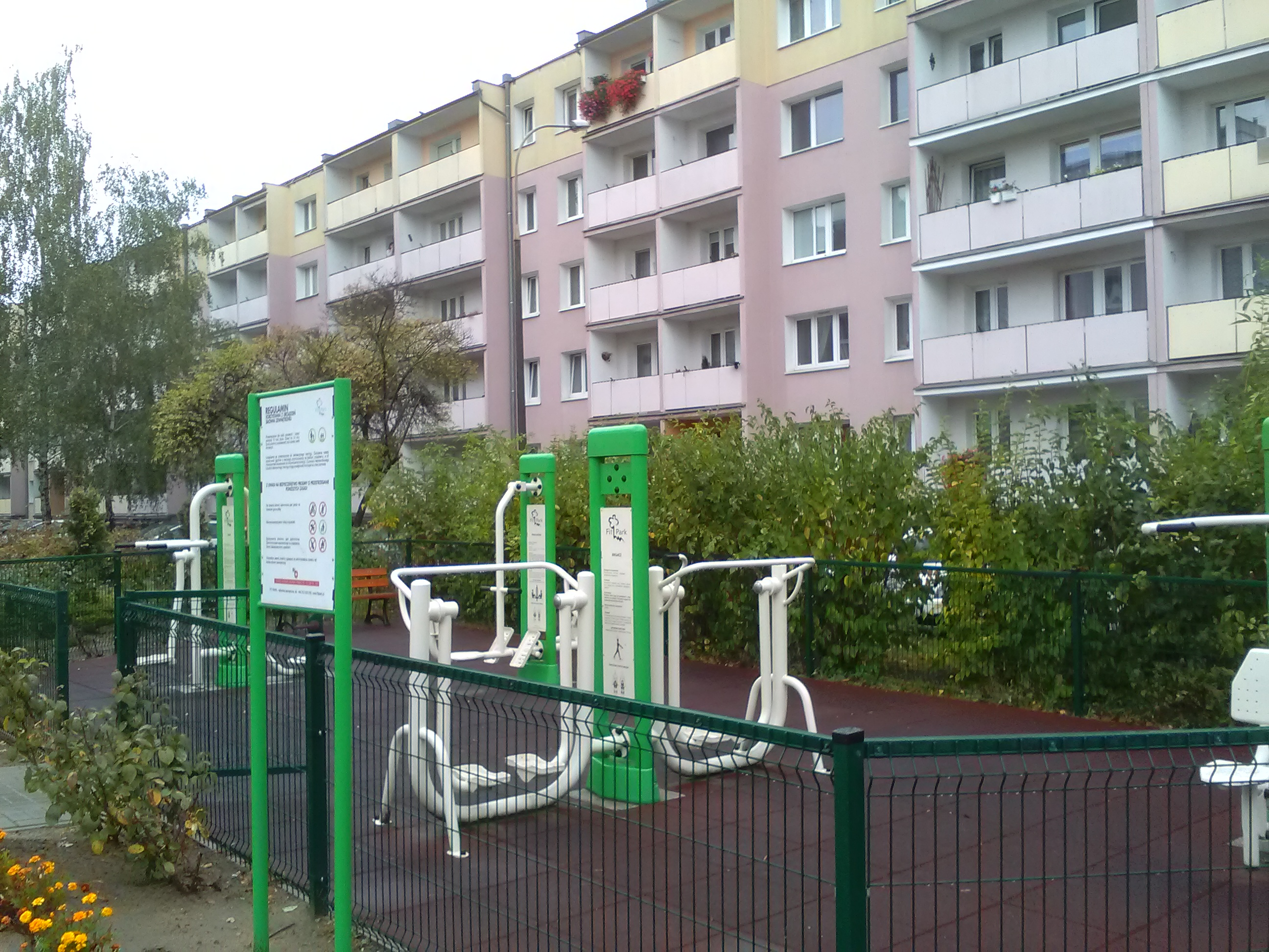 Siłownia na osiedlu Rzeczypospolitej w Poznaniu.